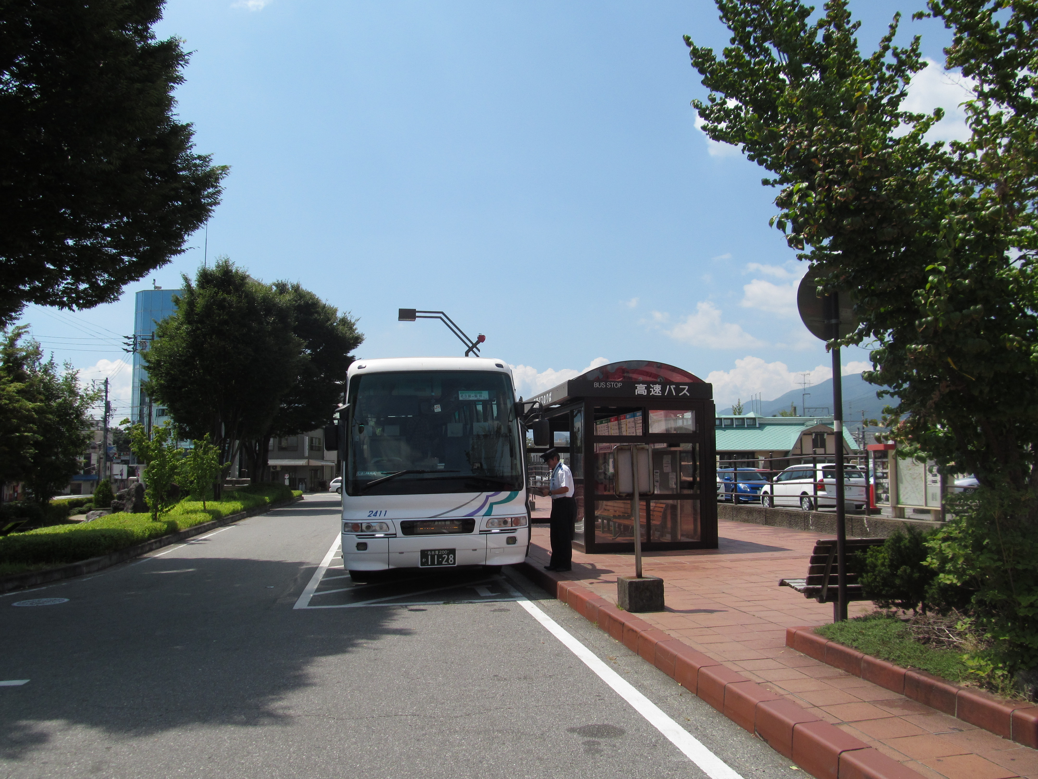 信南交通 飯田駅前 名鉄バス 名古屋行き乗車取扱中